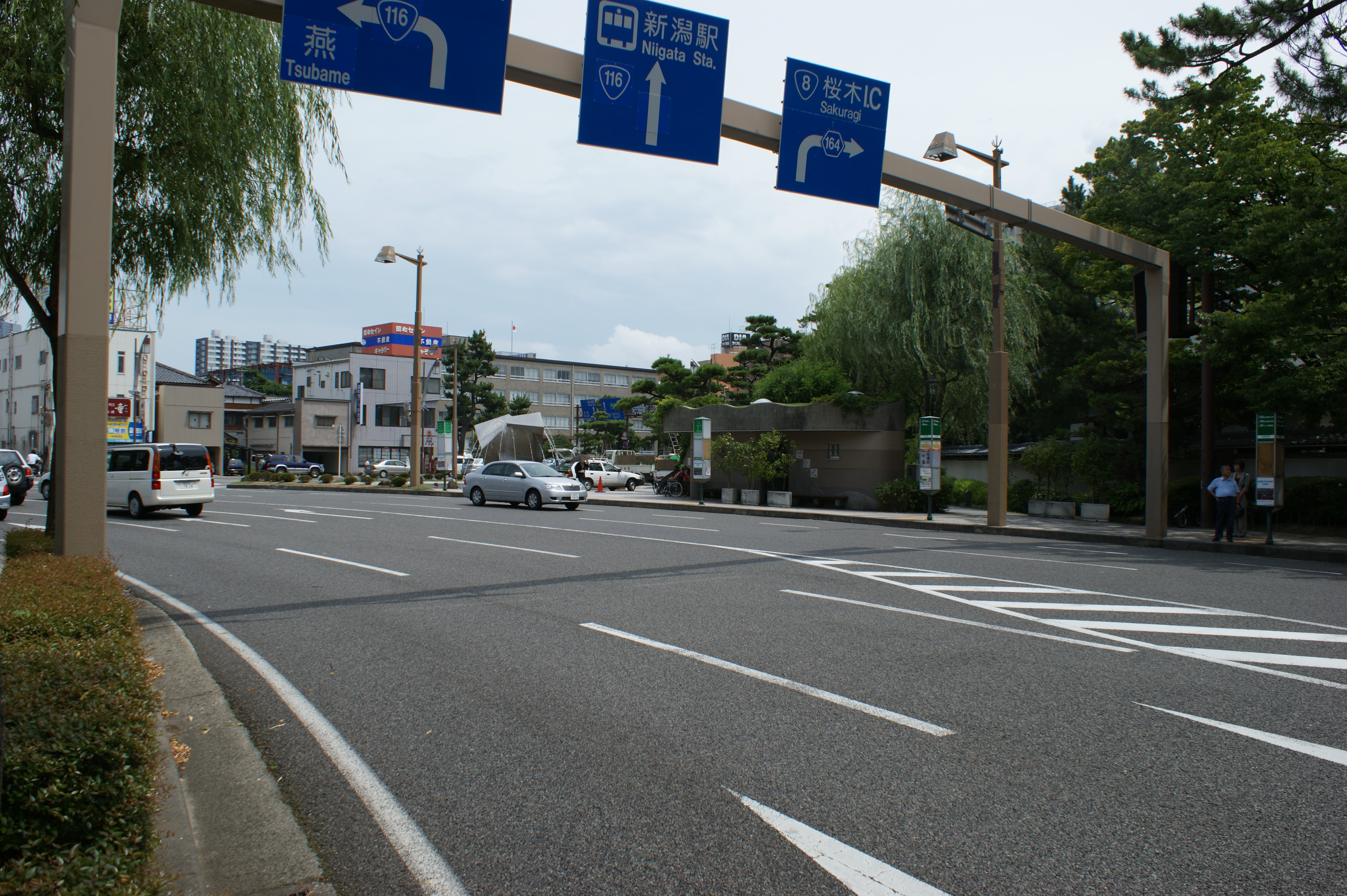 新潟交通白山前（県庁前）駅跡。線路は手前から噴水辺りに向っていた。、駅舎はその左脇にあった。旧駅舎風の公衆トイレはかつて昭和大橋方面へ抜ける道路だったところに建っている。